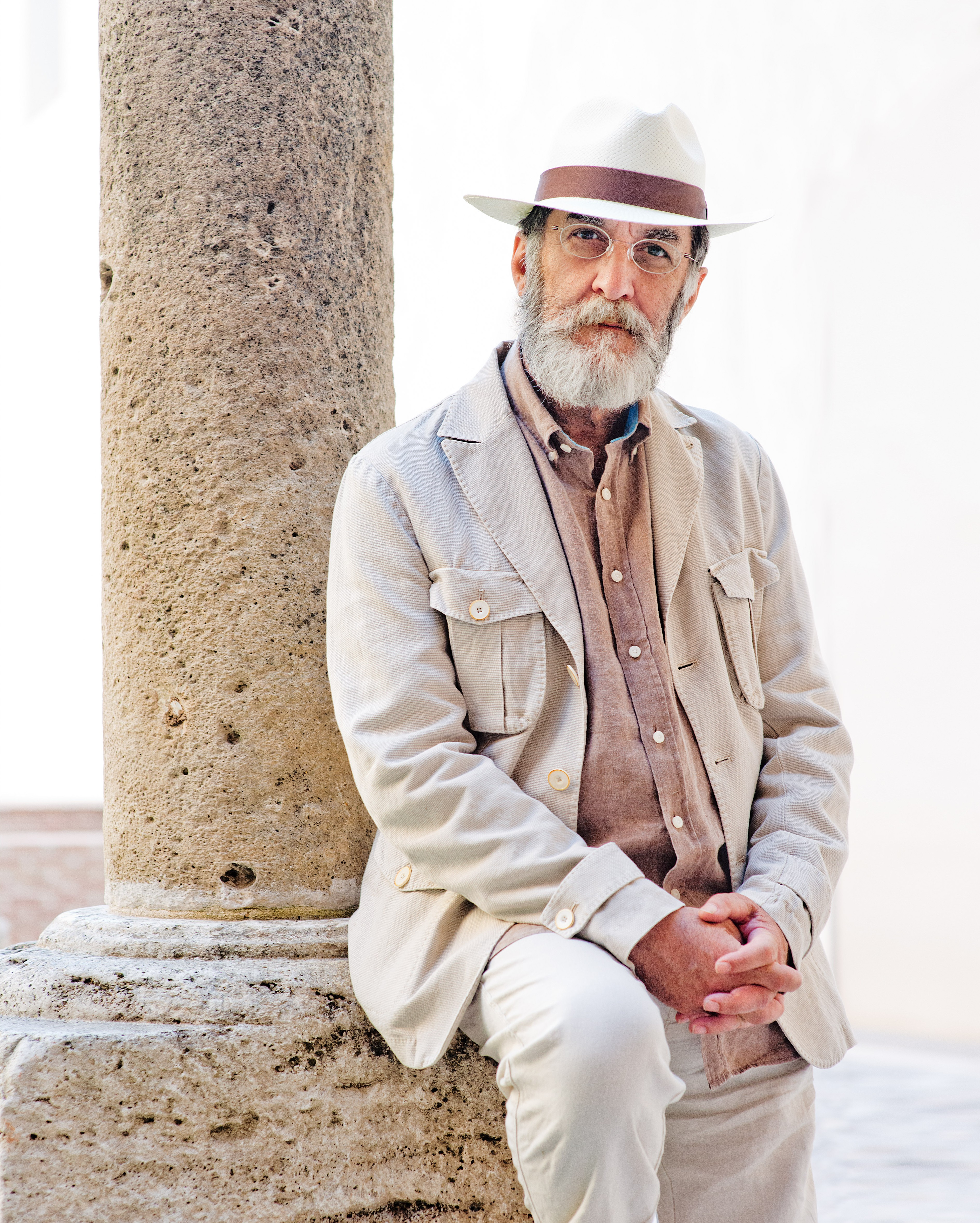 Fotógrafo: Javier Naval Confesiones de San Agustín Sobre textos de San Agustín Dirección: Juan Carlos Pérez de la Fuente Cía: Pérez de la Fuente Producciones (Madrid) 13 julio 22.45h. D: 90 min.